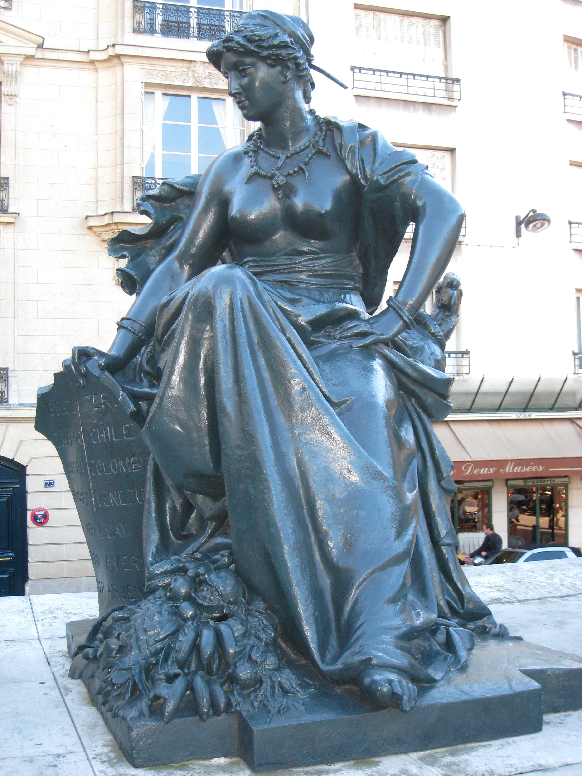 Aimé Millet - L'Amérique du Sud - parvis du Musée d'Orsay, Paris, France.